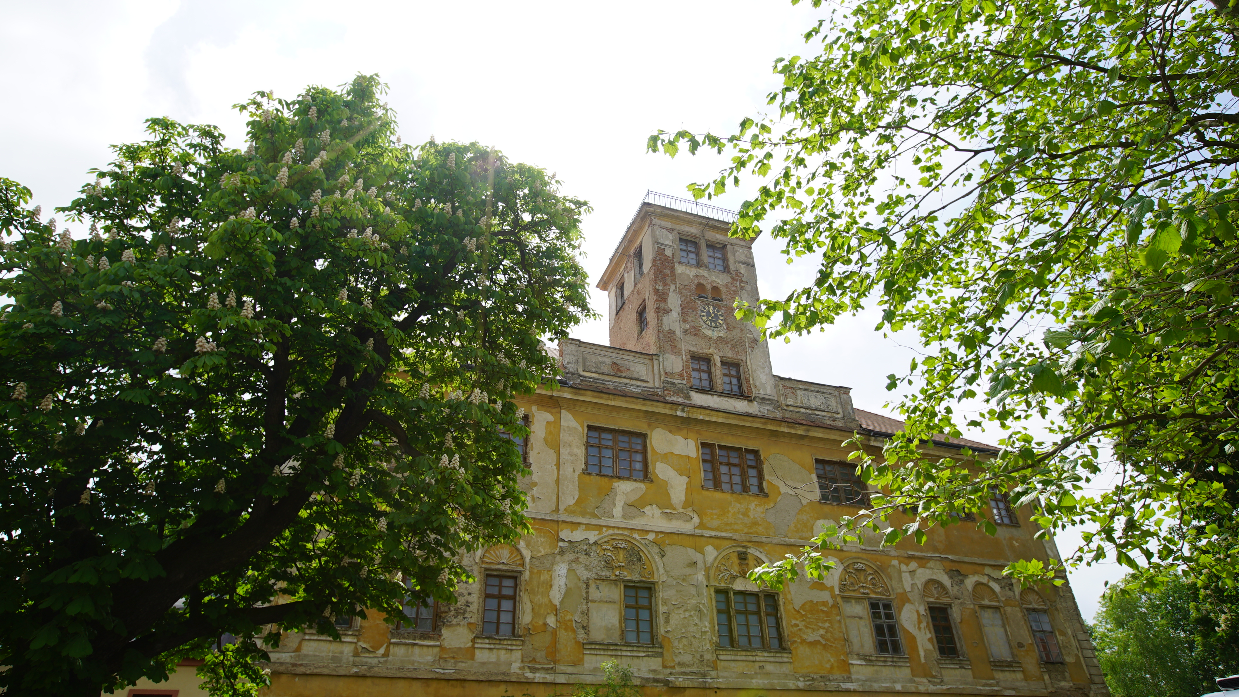 Pohled na budovu zámku v roce 2018. zdroj: magazín Krčák žije